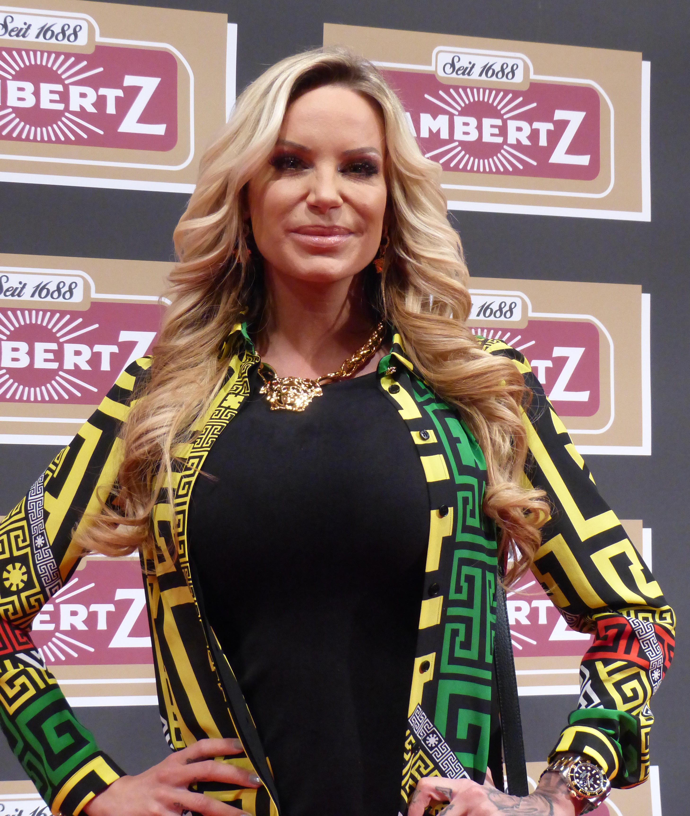 Gina Lisa Lohfink bei der Lambertz Monday Night, im Februar 2016.